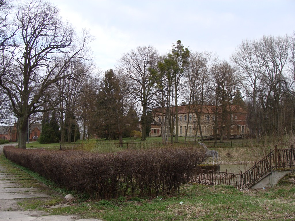 Pałac w Nowej Wiosce